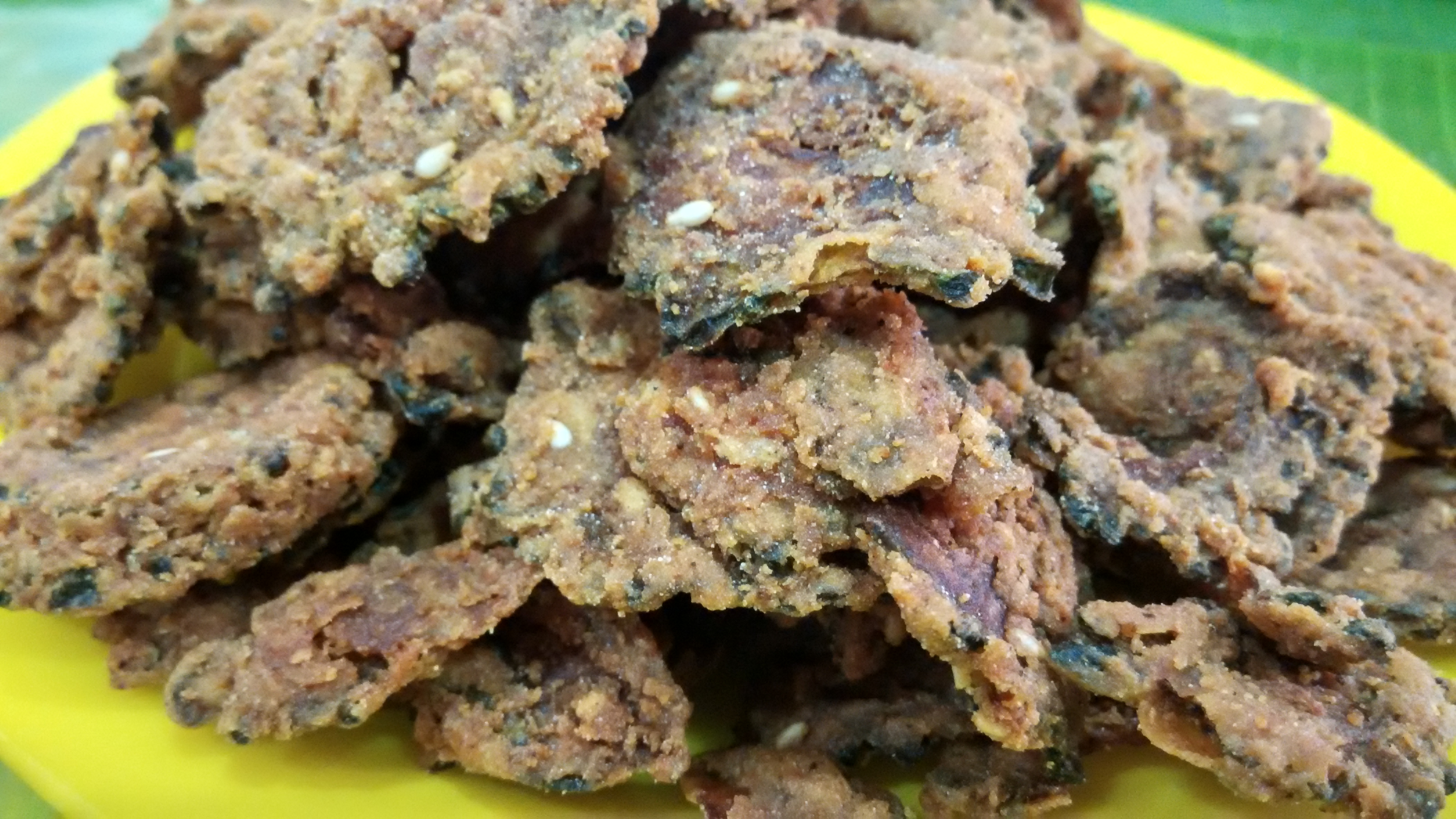 பாகற்காய் பக்கோடா.